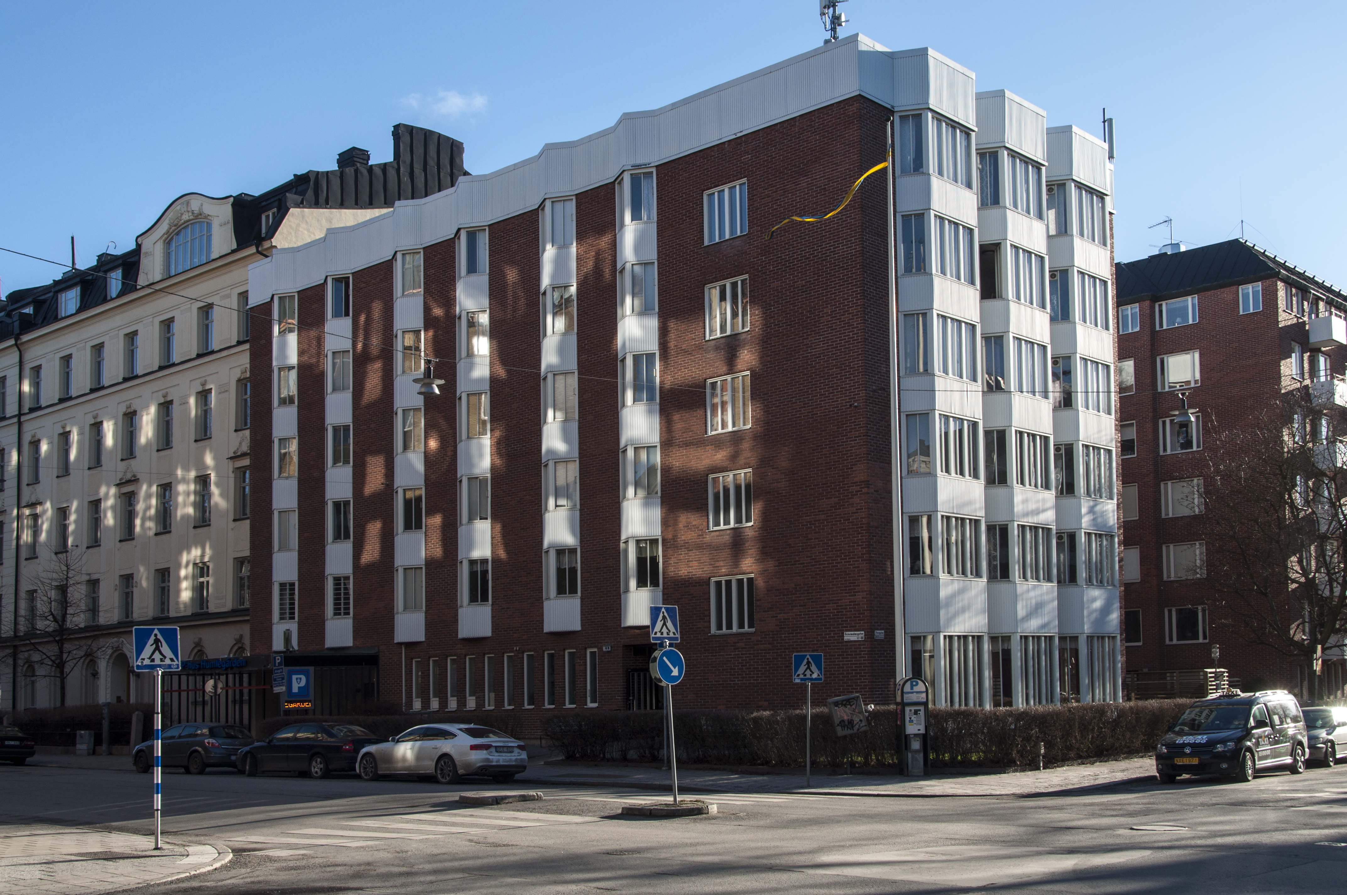 Lönnen 28, Östermalmsgatan 48 / Floragatan. Nybyggnadsår 1967 - 1972 . AB Stockholmshem (Byggherre) Anders Diös AB (Byggmästare) Backström & Reinius (Arkitekt) FSK Stockholms Stads Fastighetskontor (Byggherre)